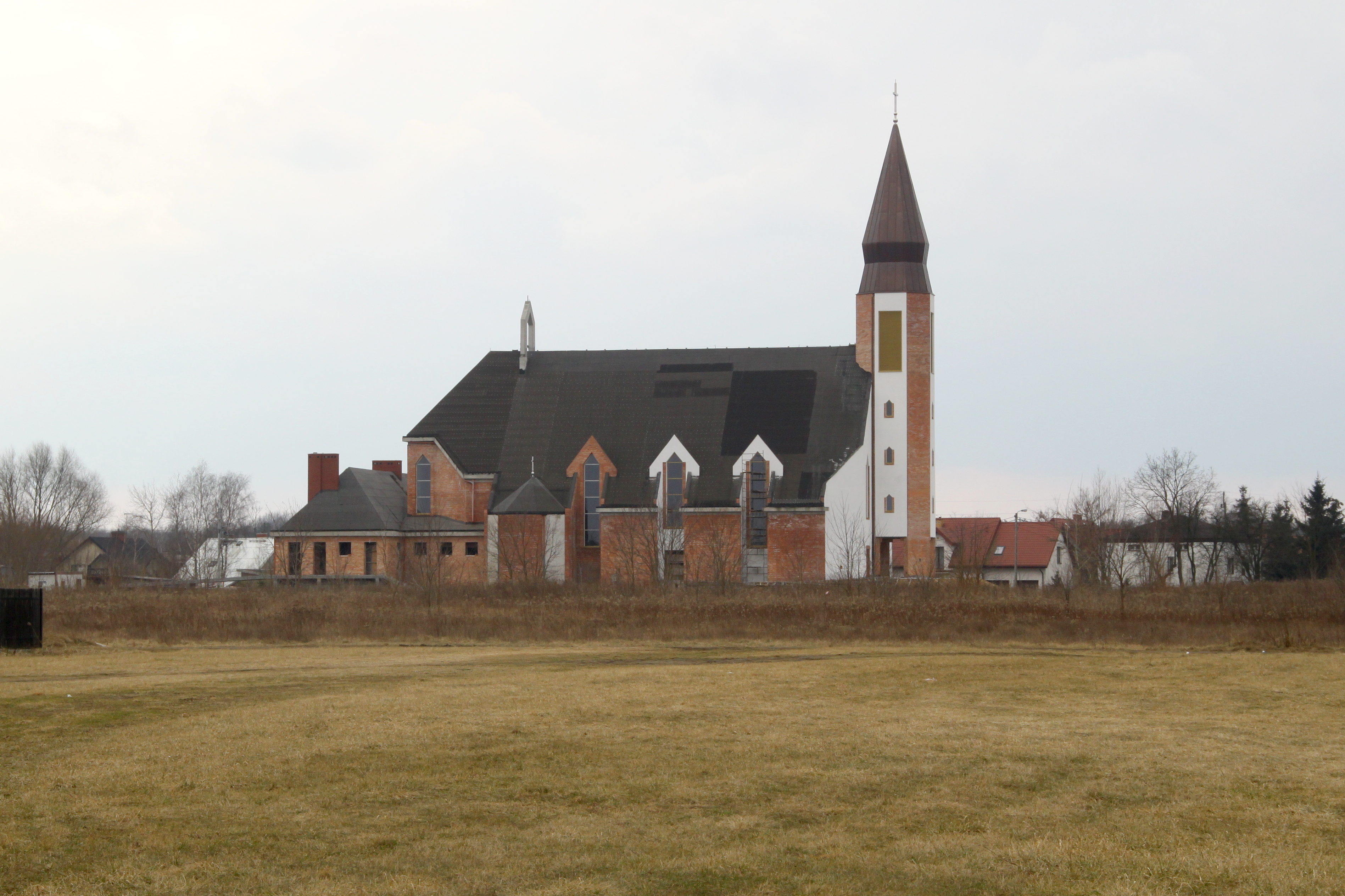 Kościół Najświętszej Maryi Panny Matki Kościoła w Markach przy ulicy Ząbkowskiej. Zdjęcie wykonane z ulicy Fabrycznej.